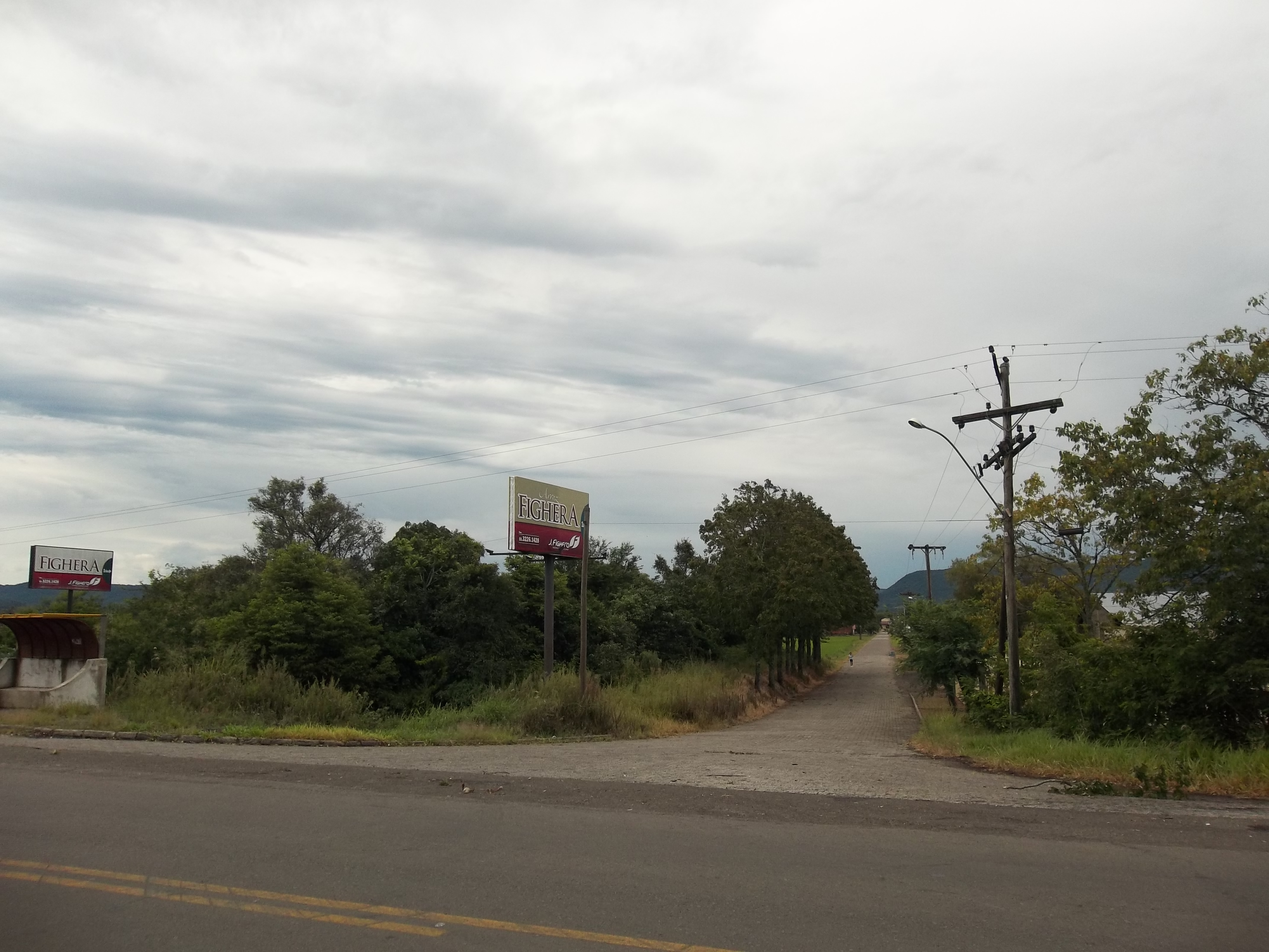 Estrada Municipal José Santo Fighera. Vila Fighera, Arroio Grande, Santa Maria, Rio Grande do Sul, Brasil